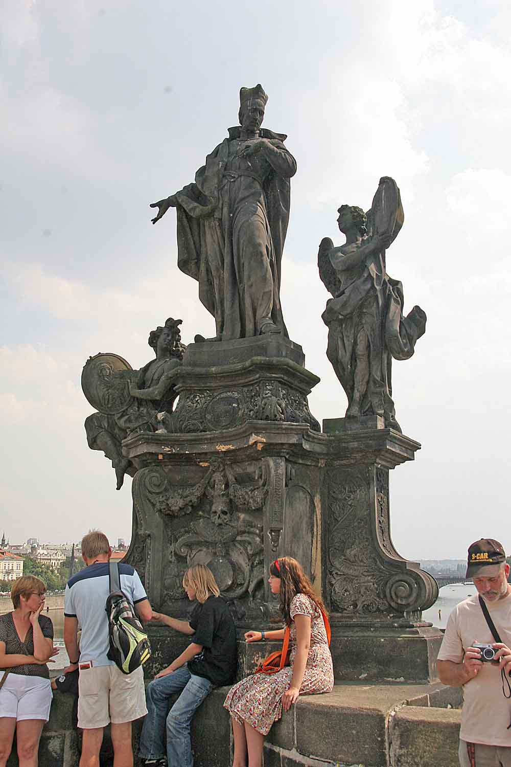 Sousoší Svatého Františka Borgiáše na Karlově mostě